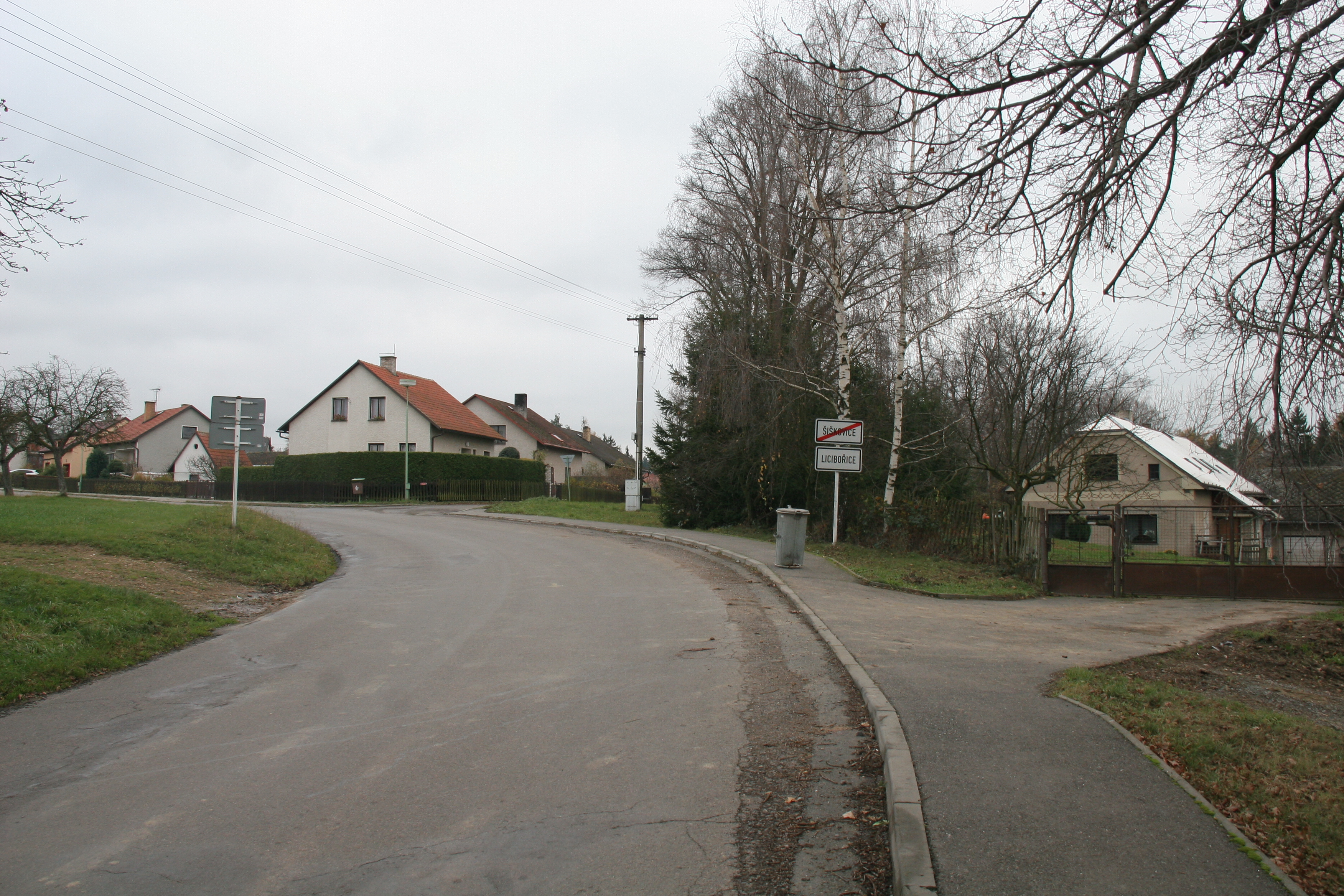 Licibořice čp. 41